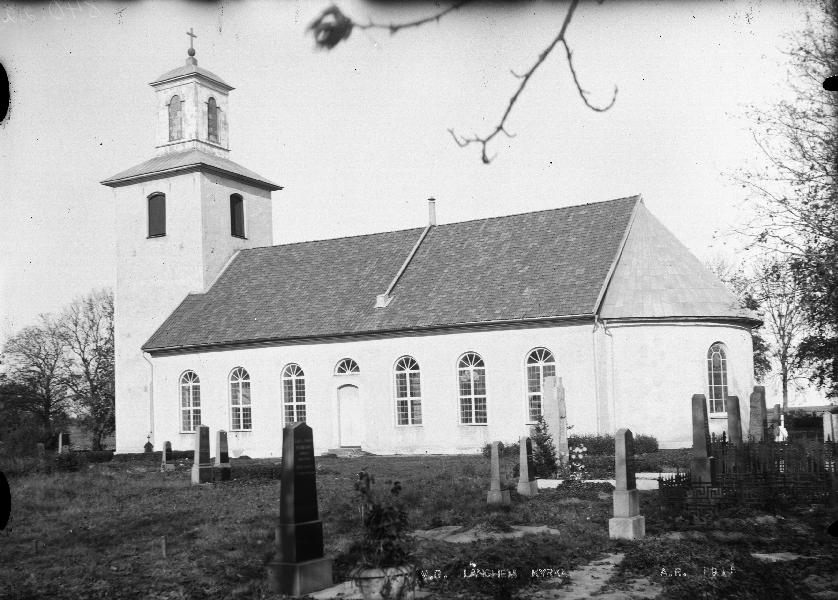 Kyrkan från sydöst.